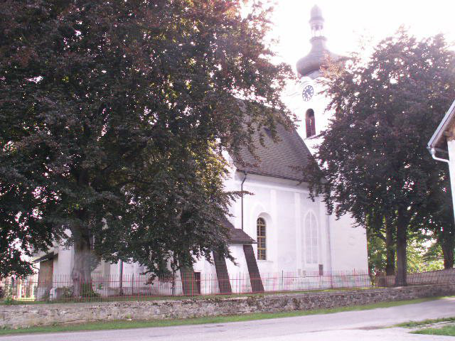 Horní Dvořiště - Church "Svateho Michala"